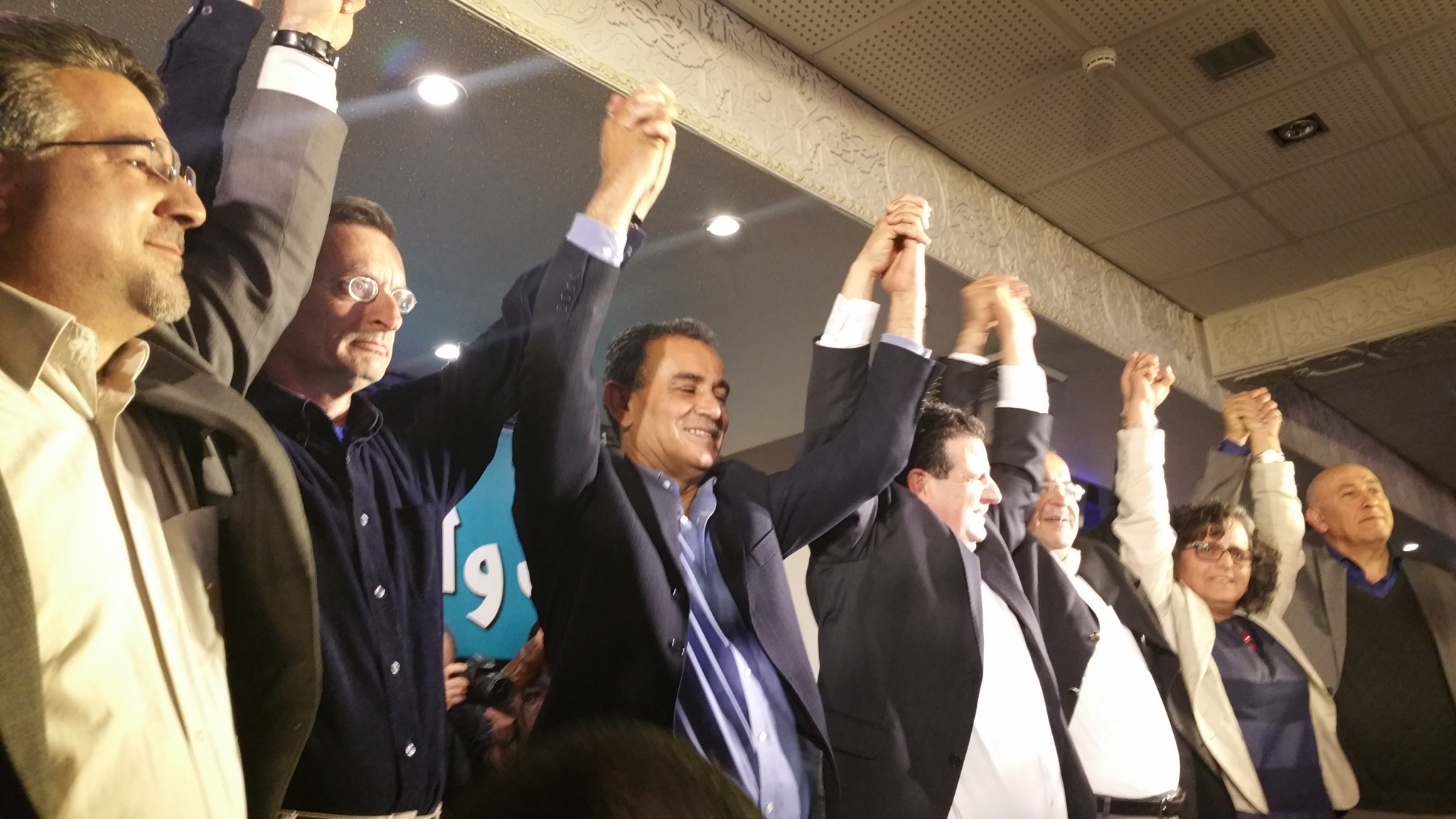 joint list הרשימה המשותפת القائمة المشتركة election night in nazareth